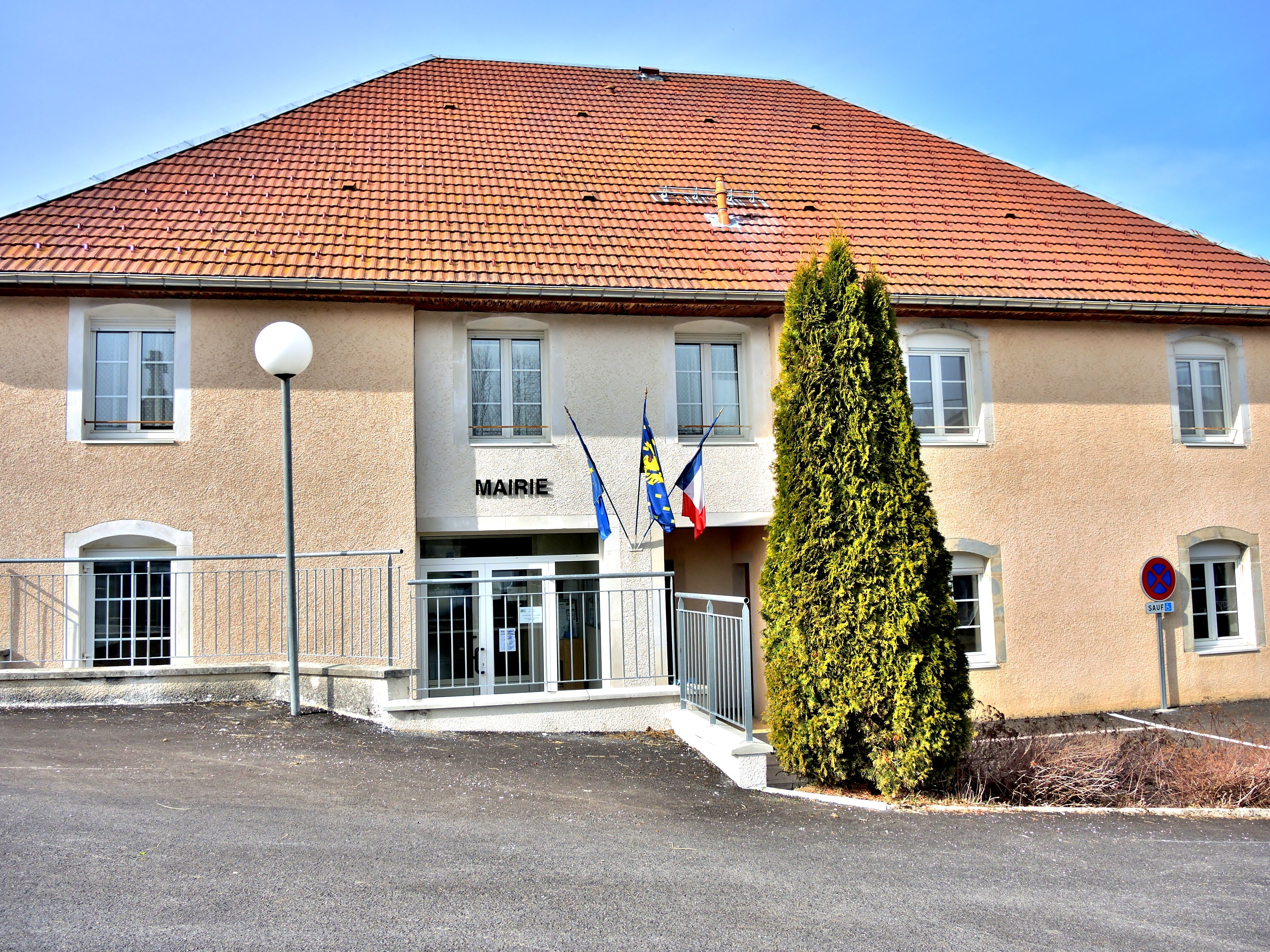 Mairie de Passonfontaine. Doubs.